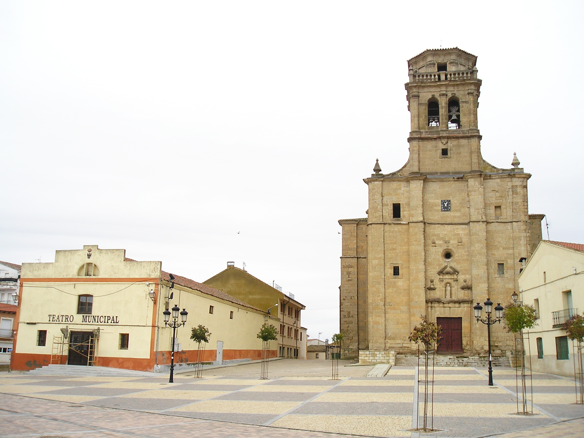 Iglesia Parroquial de Santa María del Castillo